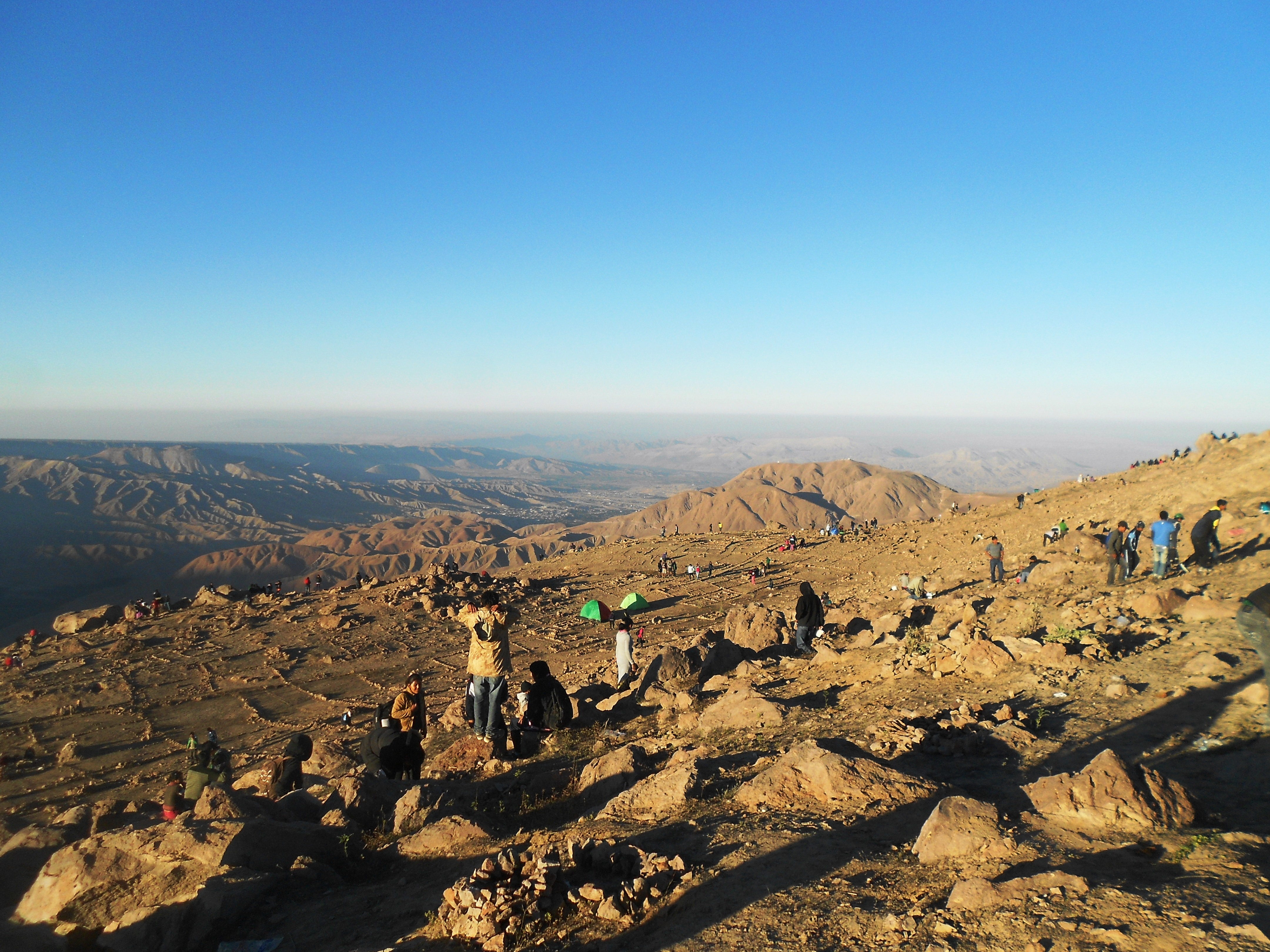 Cerro Baul, Torata, Moquegua